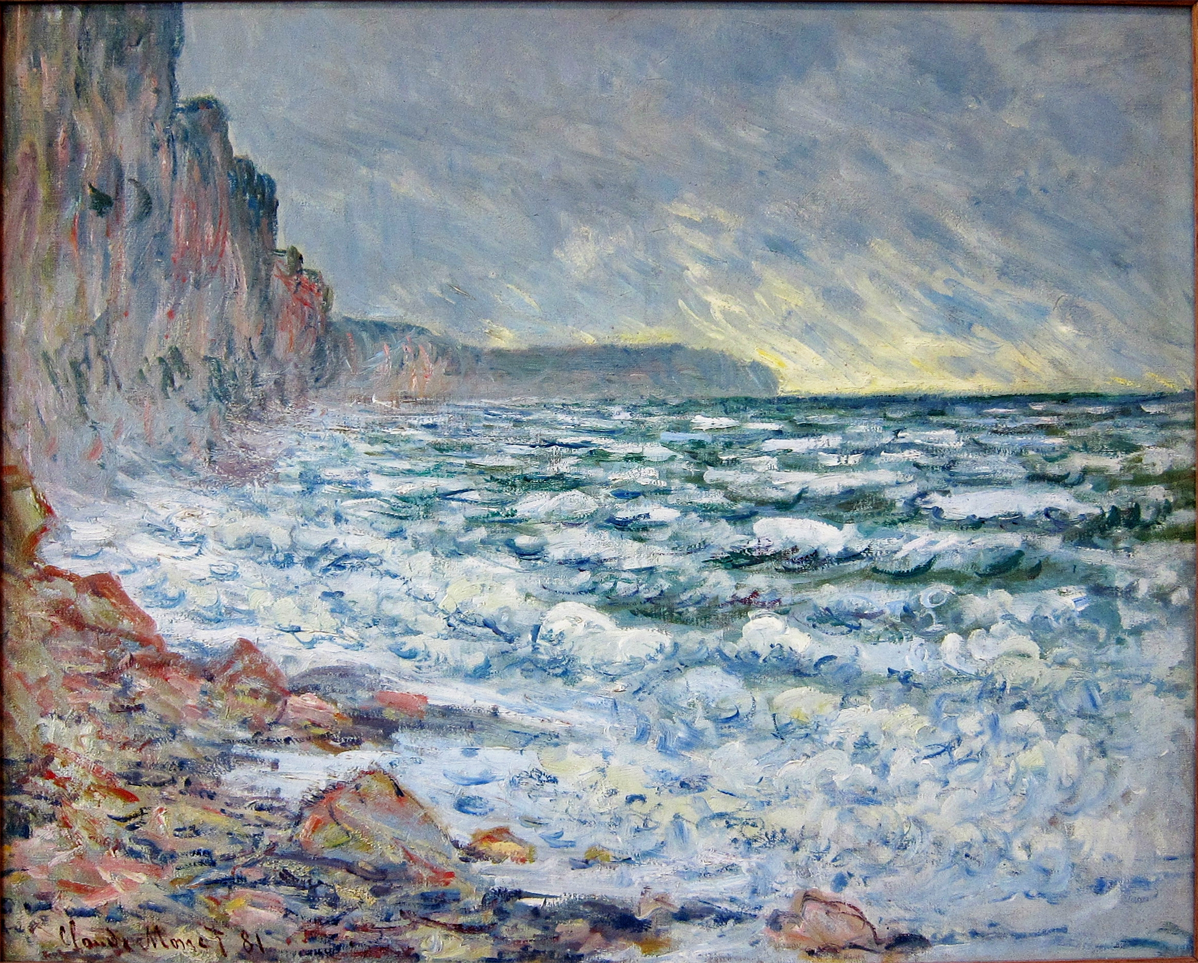 Fécamp, bord de mer au musée des Beaux-Arts André Malraux du Havre.